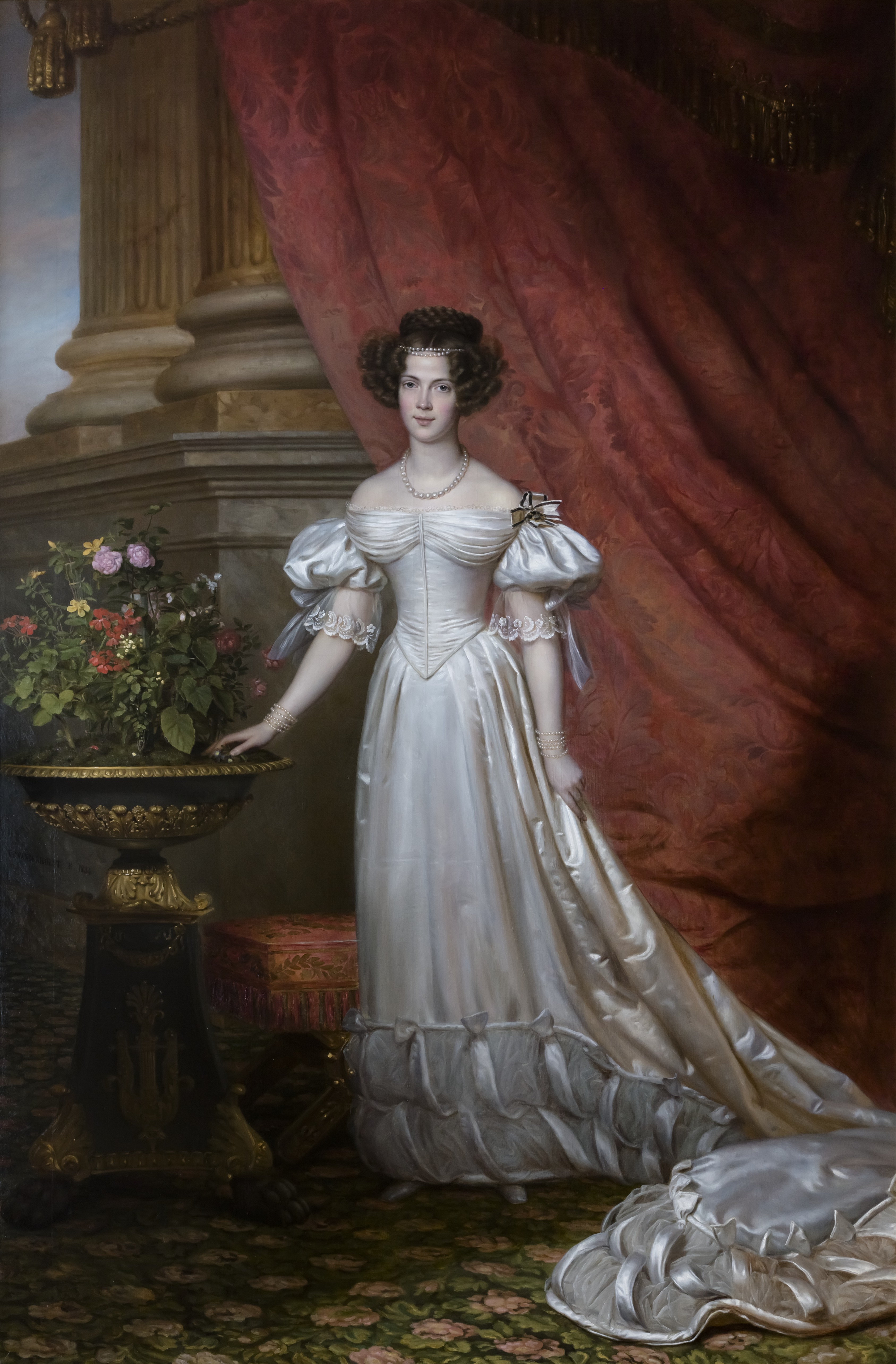 Marianne, prinses der Nederlanden